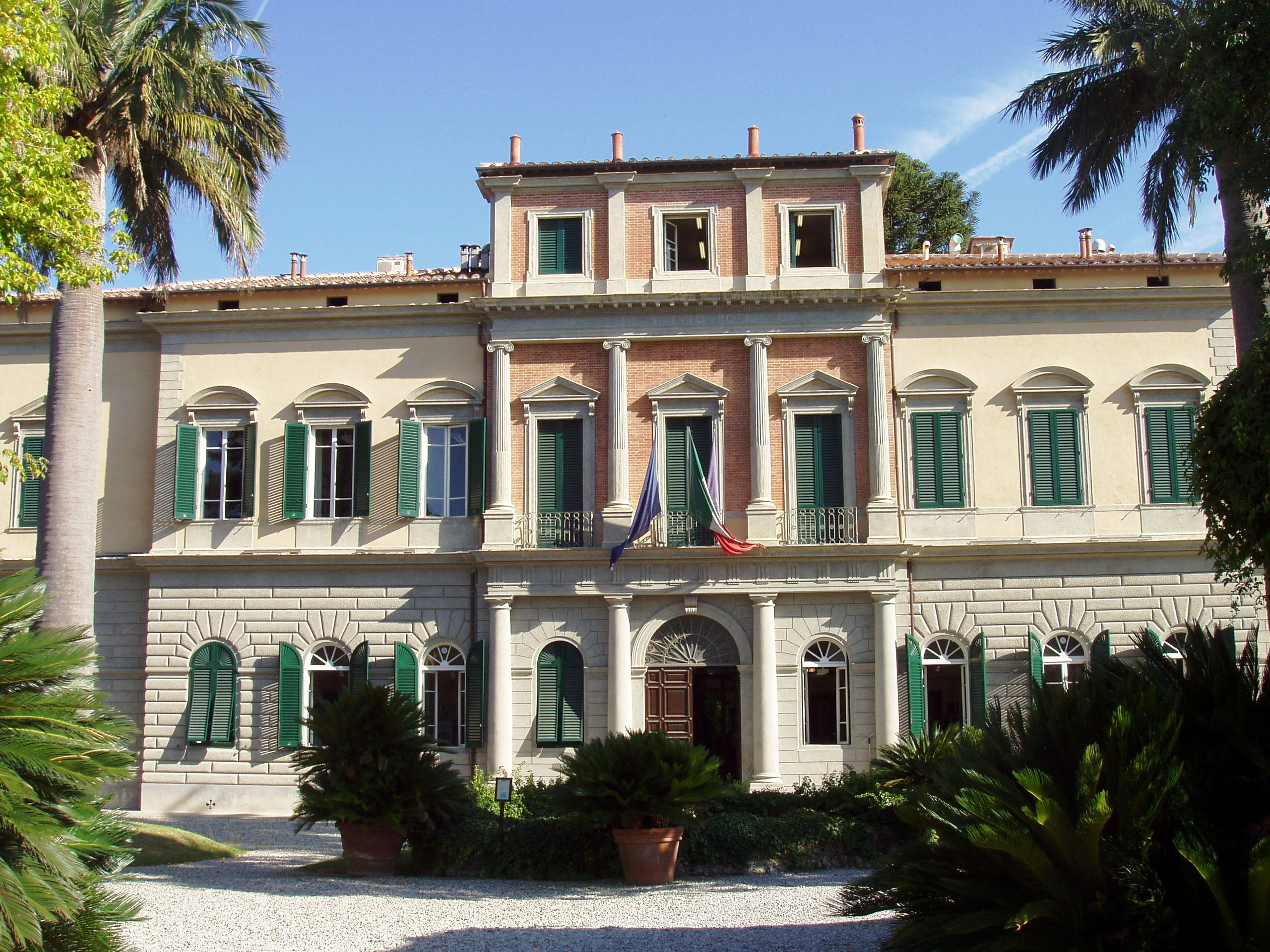 Orto botanico di Pisa - school building. Pisa, Italy.